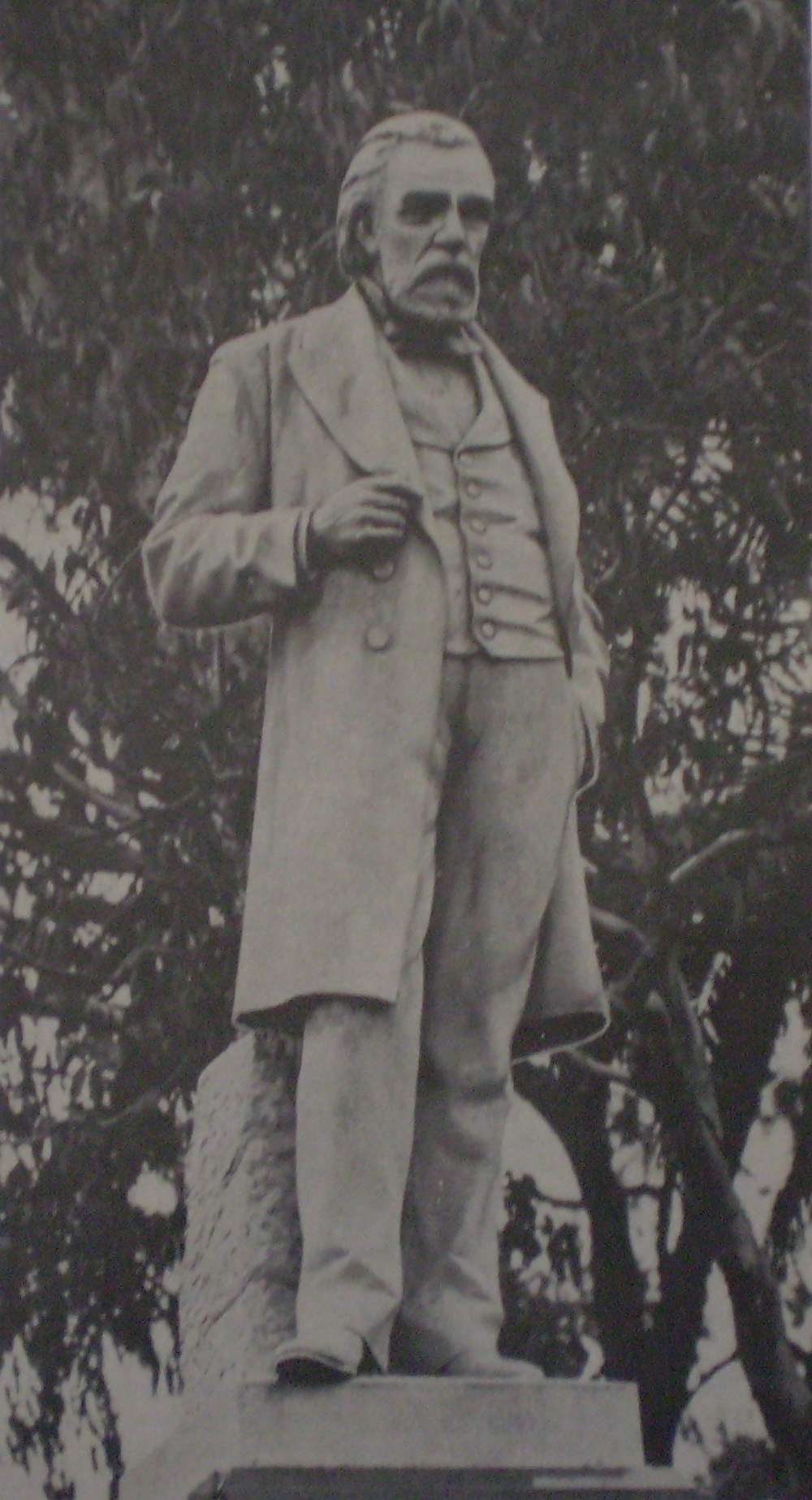 Escultura de Carlos Tejedor. Mármol de Lucio Correa Morales